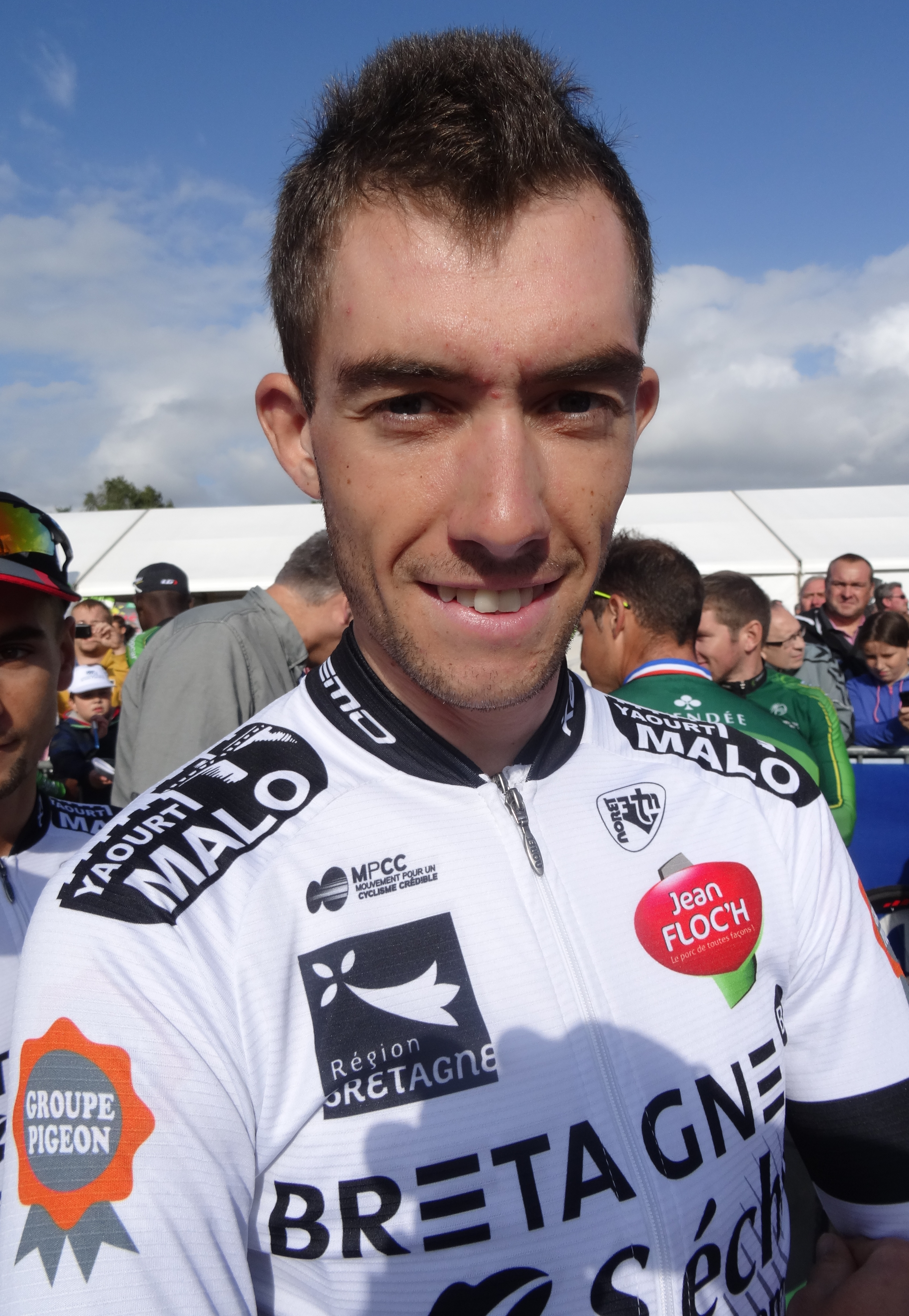 Reportage réalisé le dimanche 21 septembre à l'occasion du départ et de l'arrivée du Grand Prix d'Isbergues 2014 à Isbergues, Nord-Pas-de-Calais, France.